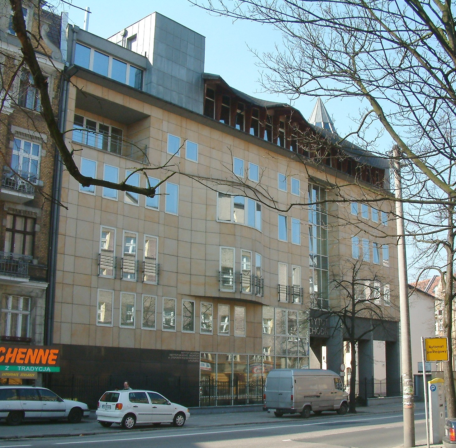 Western Institute in Poznań